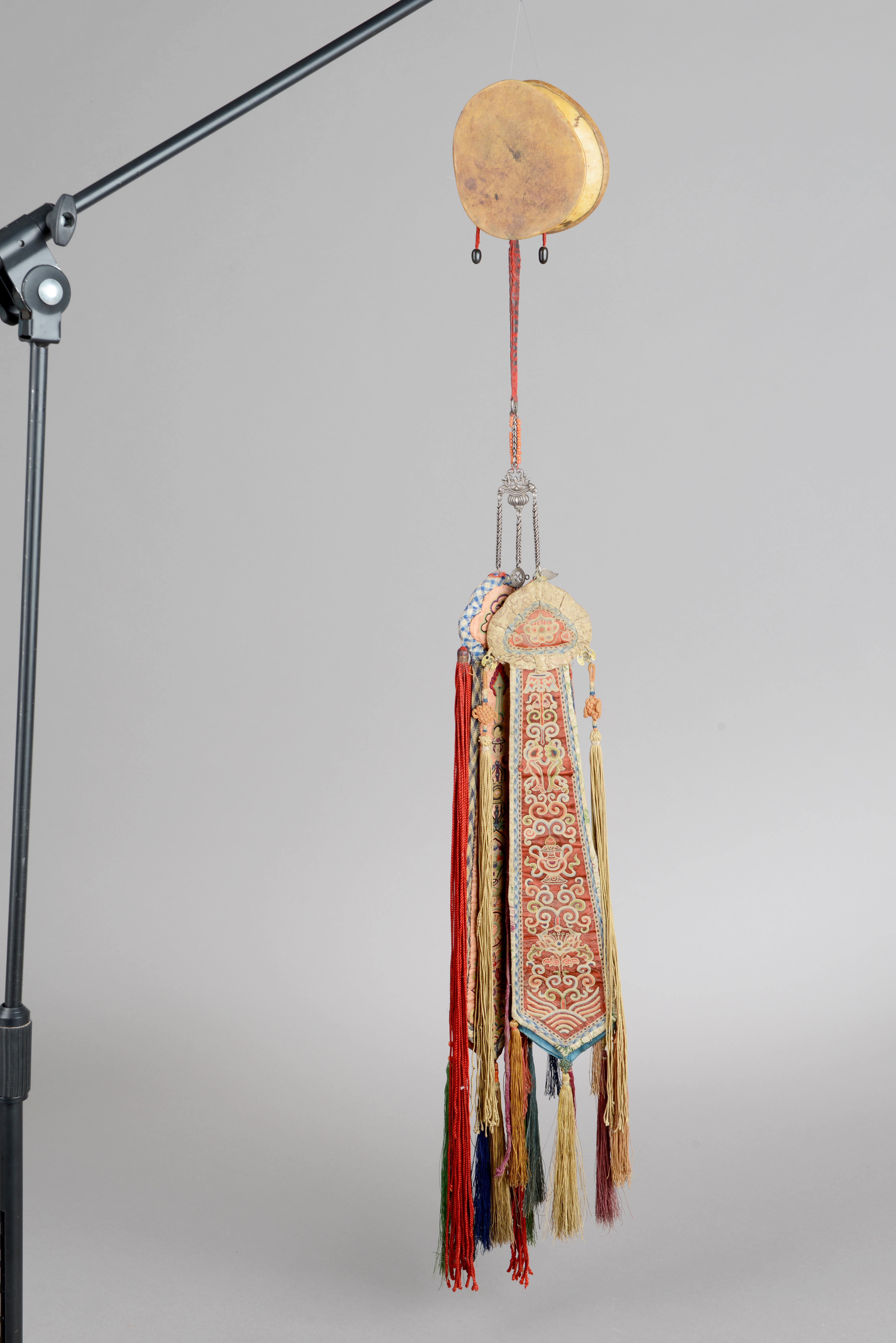 Bęben Damaru - Zbiory Muzeum Azji i Pacyfiku w Warszawie